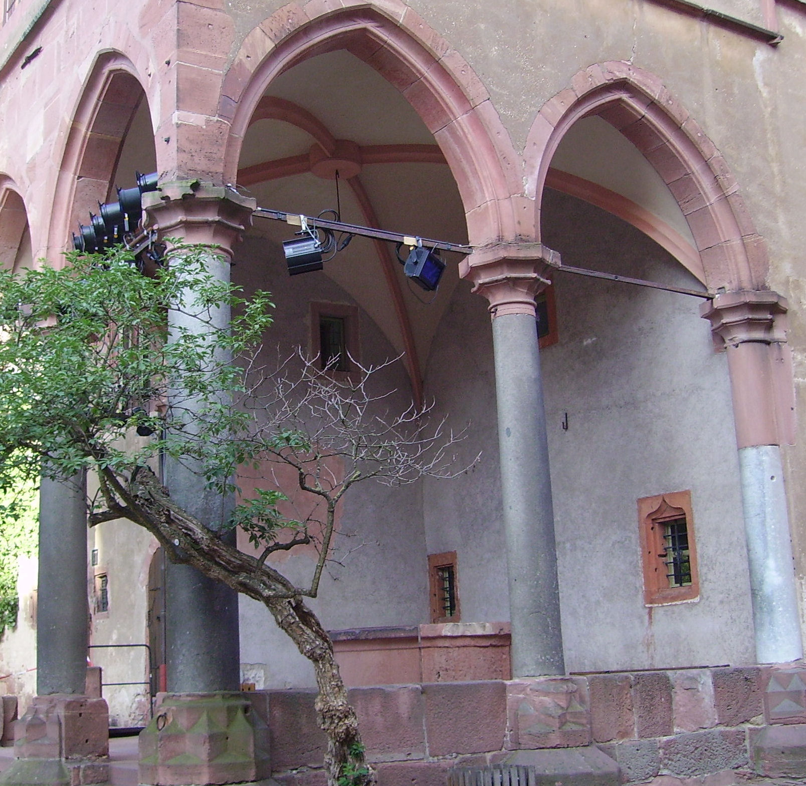 Heidelberger Schloss